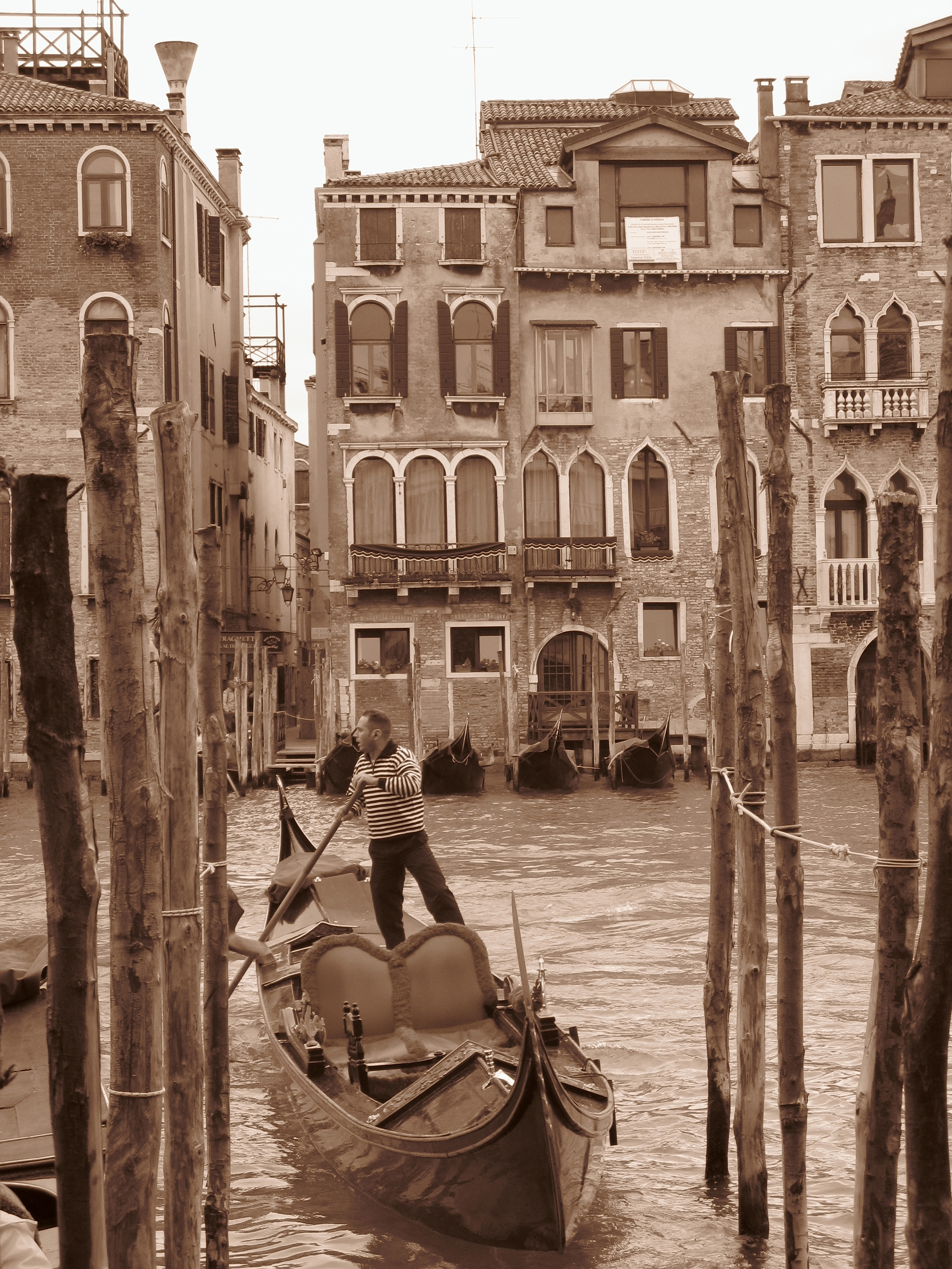 Gondoliere bei der Arbeit (Venezia, it)